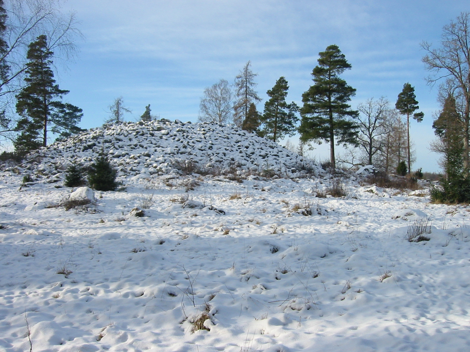 Gravröset i Värperör strax utanför Kolbäck, Hallstahammars kommun.